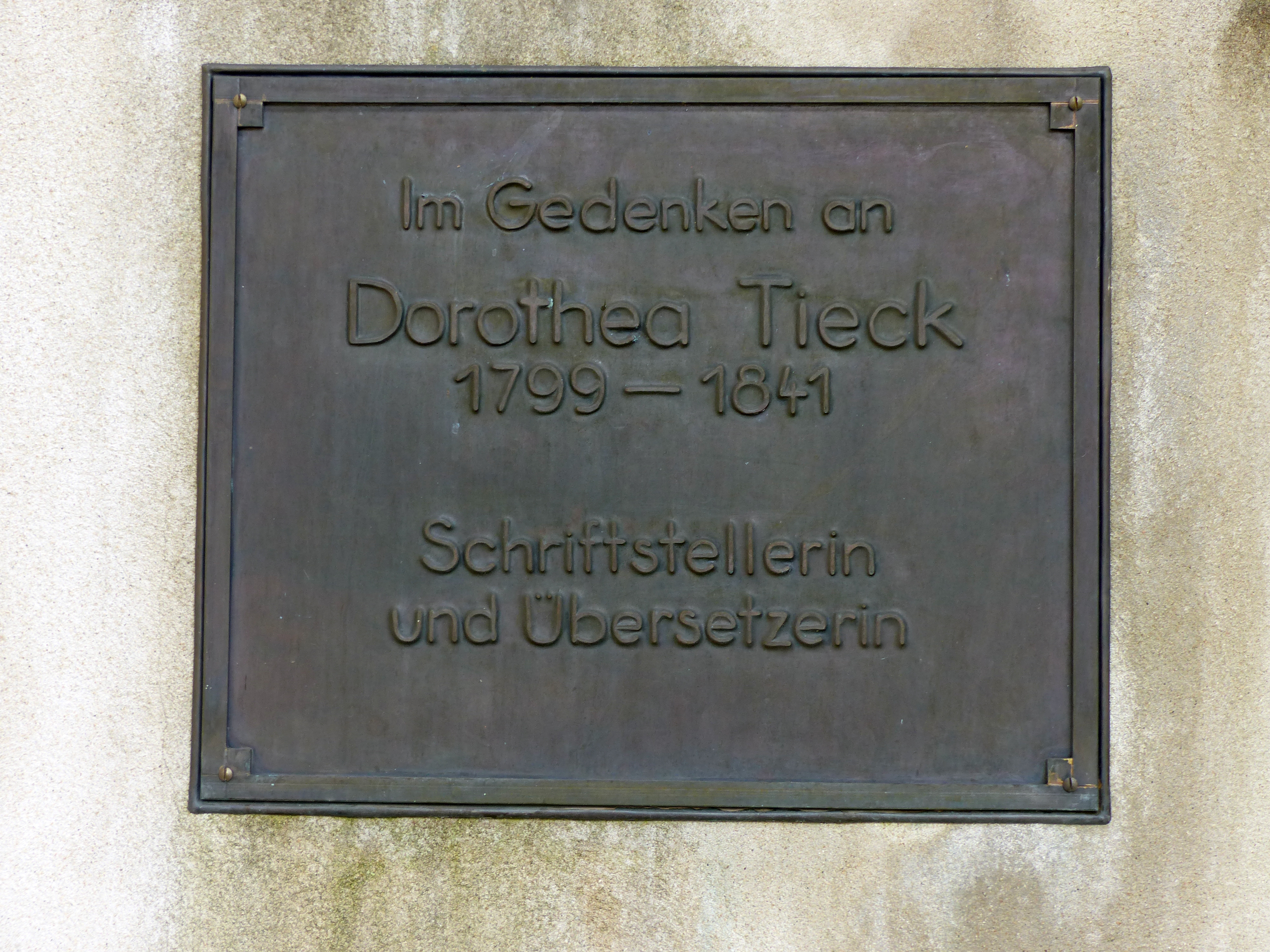 Gedenktafel für Dorothea Tieck auf dem Alten Katholischen Friedhof, Friedrichstraße 54, in Dresden